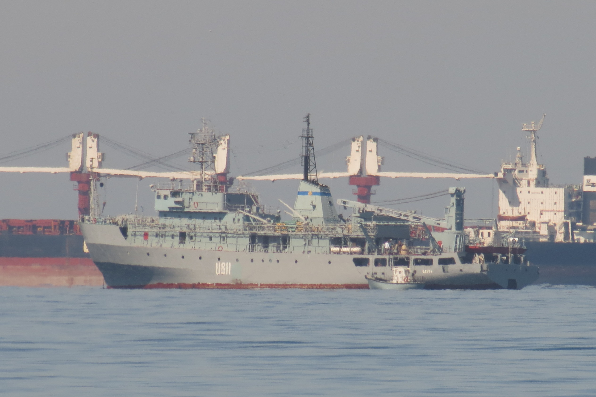 King Edward и судно размагничивания Балта (U811) перед ним на рейде Севастополя